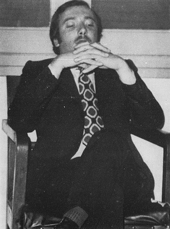 Italian criminal Lorenzo Bozano